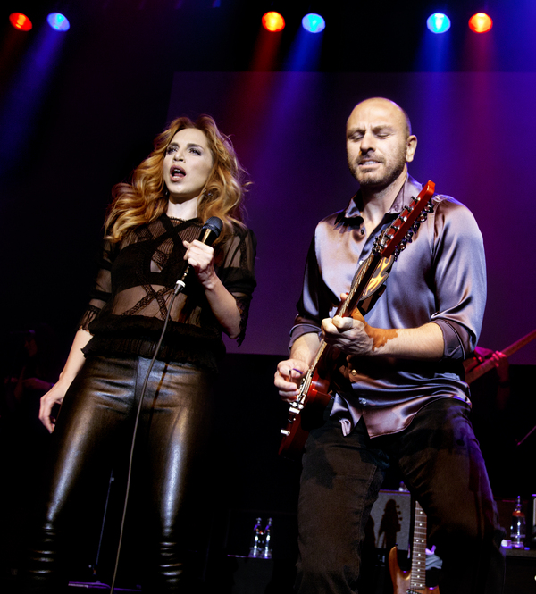 Sertab Erener bir konserinde çekilmiş, Tony Parera tarafından.